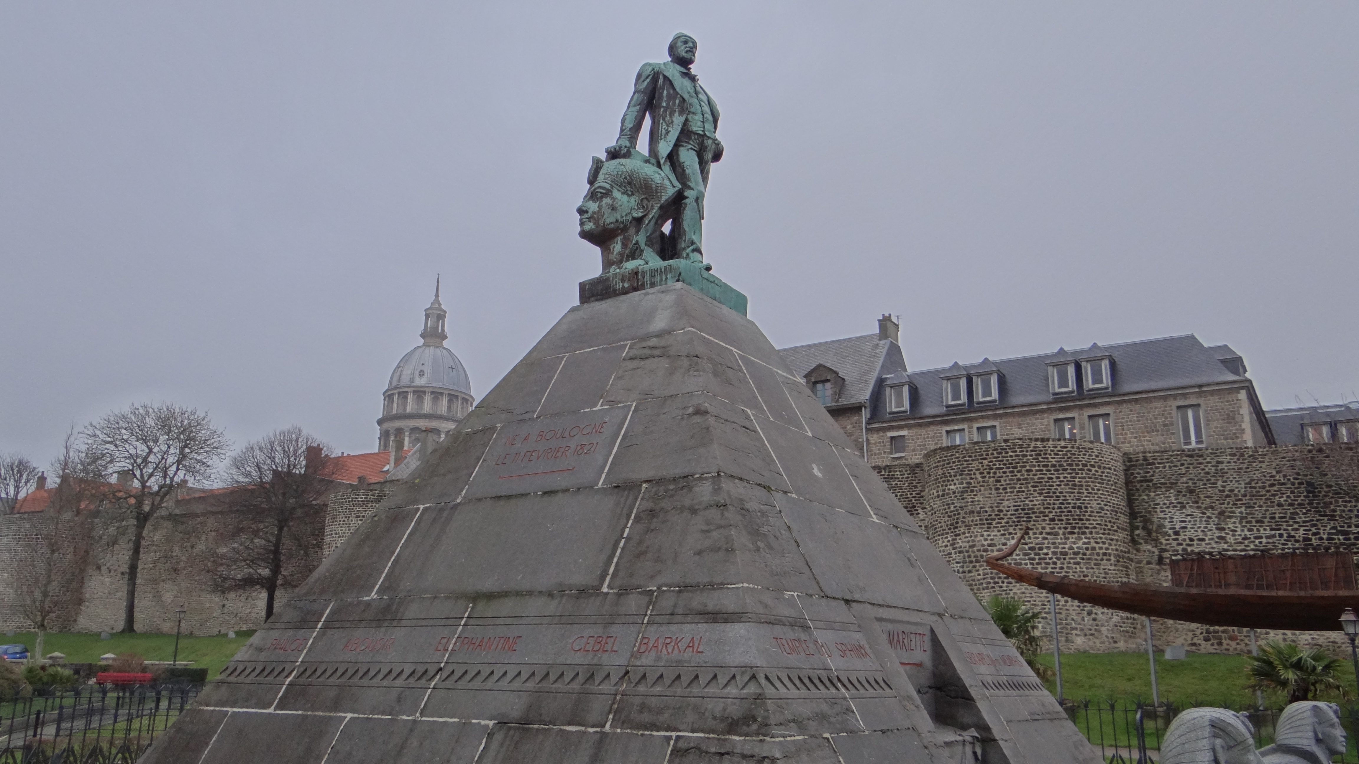 Boulogne-sur-Mer - La pyramide Mariette-Pacha